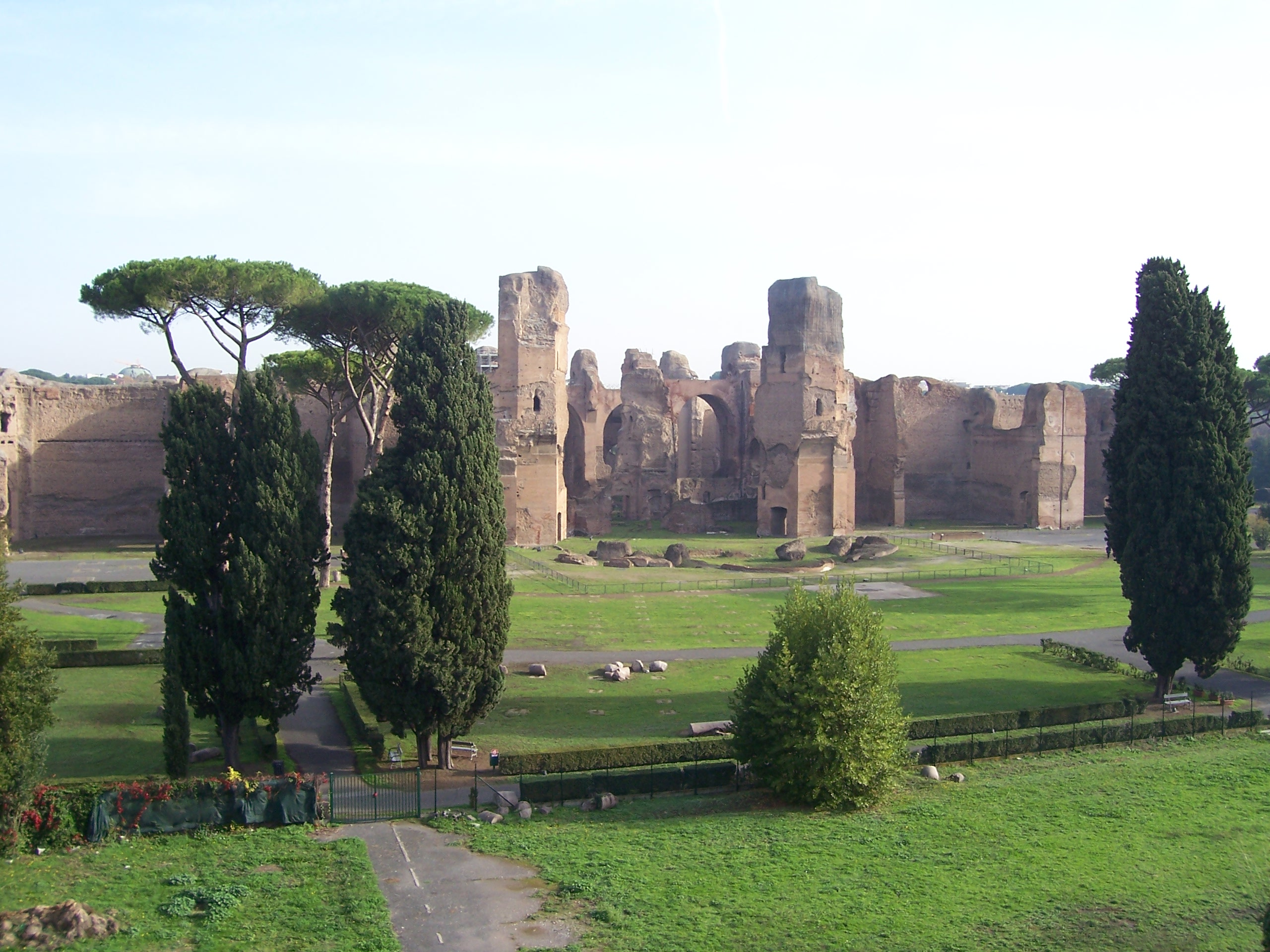 Terme di Caracalla a Roma